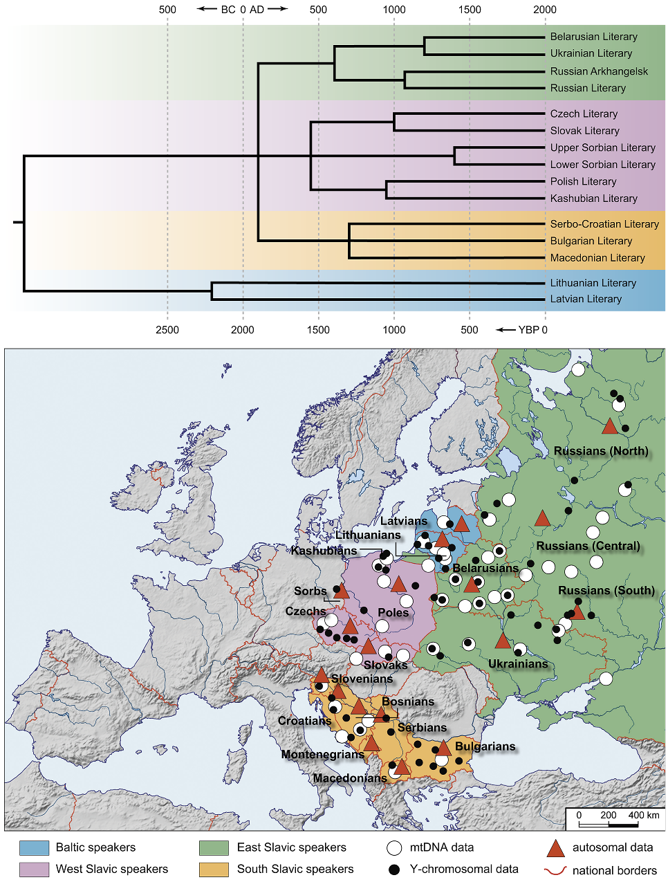 Древо и карта славянских языков по Дыбо и Касьяну